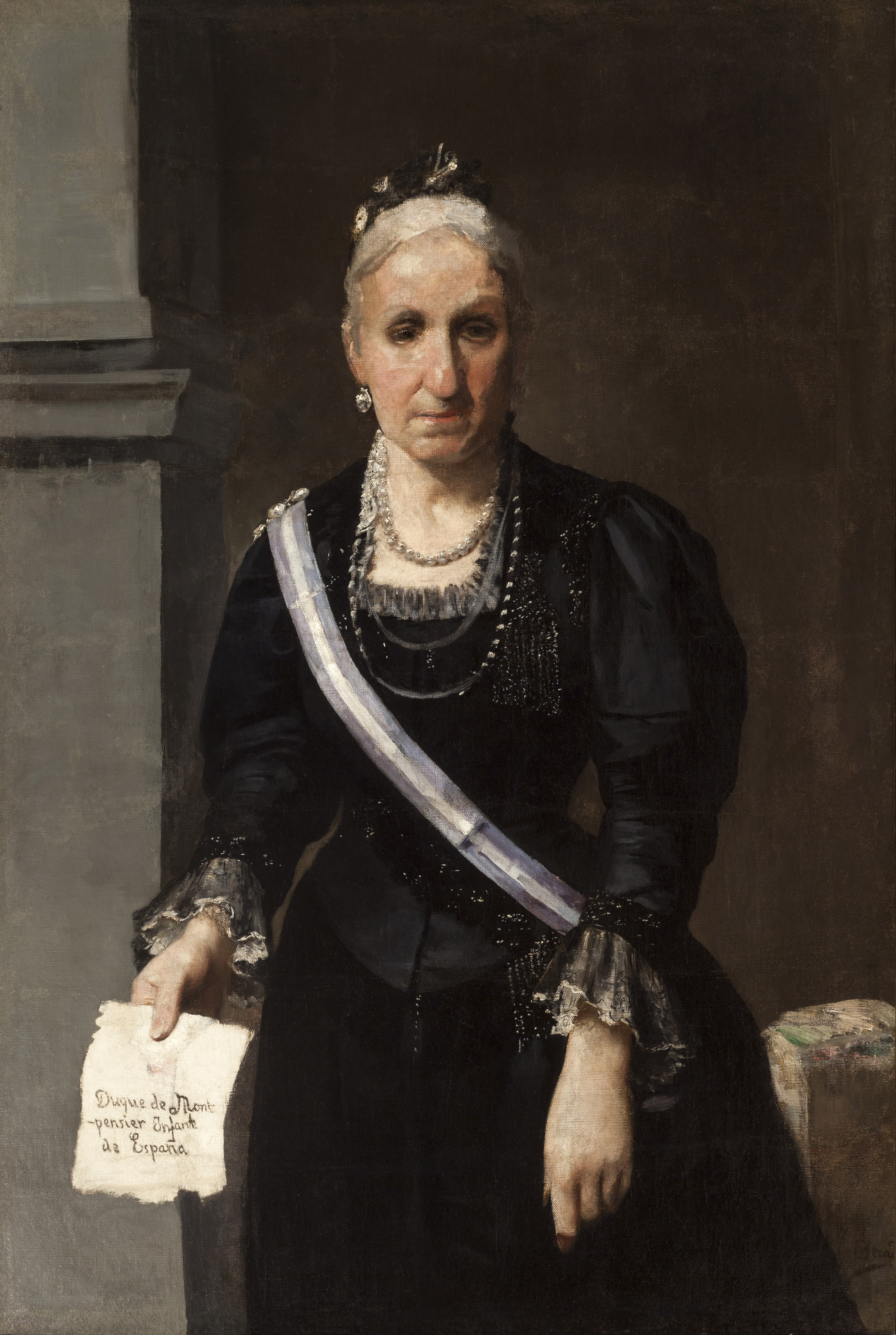 Retrato de la infanta Luisa Fernanda de Borbón (1832-1897), que fue hija del rey Fernando VII de España y hermana de la reina Isabel II.